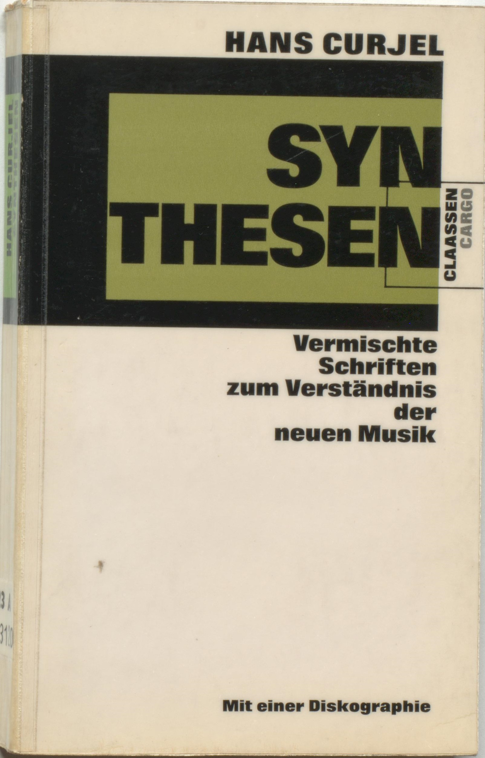 Hans Curjel Synthesen. Vermischte Schriften zum Verständnis der neuen Musik. Hamburg : Claassen, 1966 Einband Hans Curjel Synthesen 1966 Einband